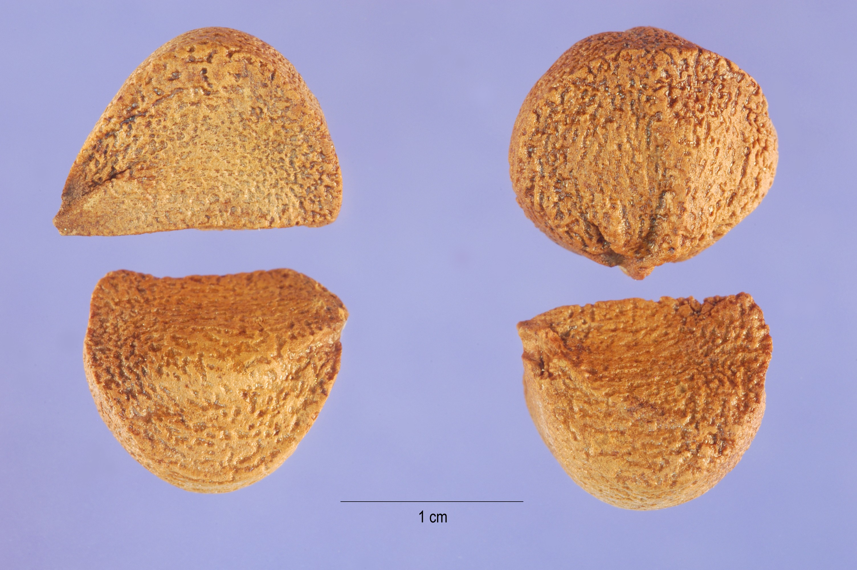 Iris giganticaerulea, Small giant blue iris